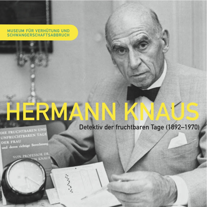 Der österreichische Gynäkologe Hermann Knaus, Entdecker der fruchtbaren und unfruchtbaren Tage im weiblichen Zyklus